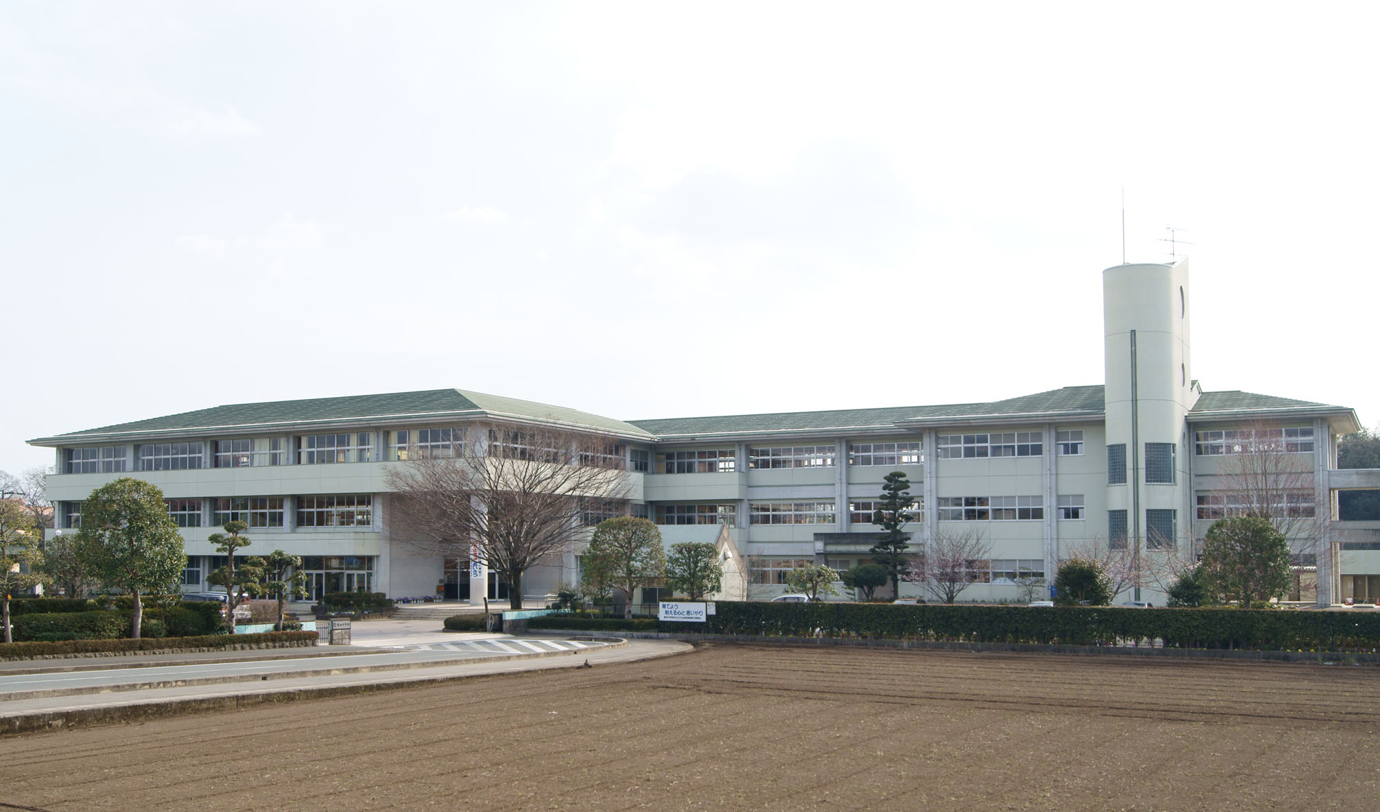 熊本市立龍田中学校